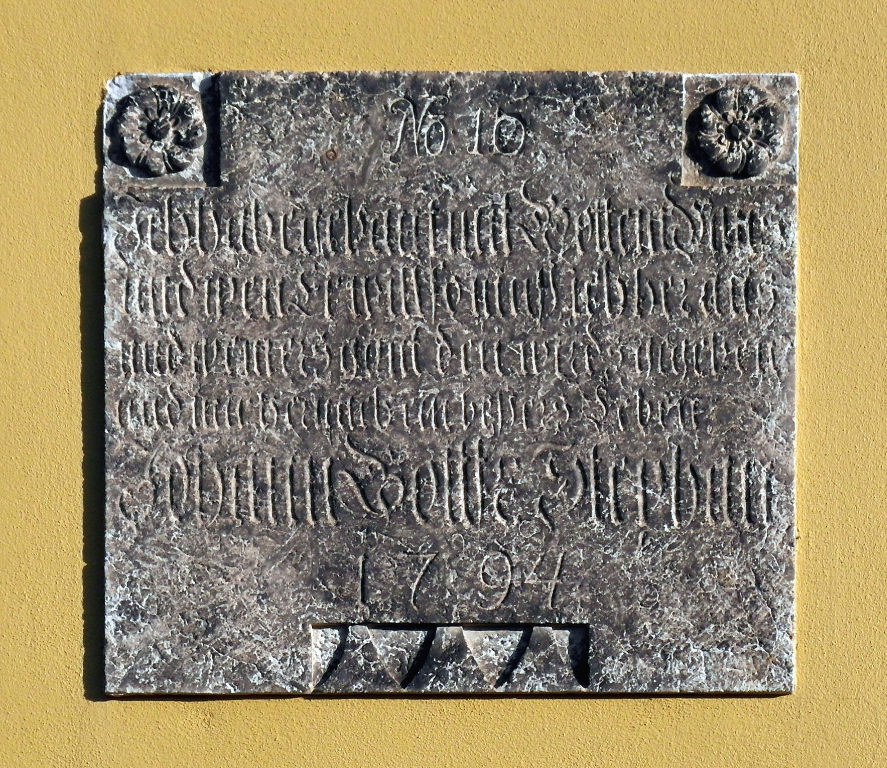 19.01.2019 01796 Goes (Dohma): Dorfanger Goes in Form eines Rundlings mit Dorfteich. Haustafel / Inschriftenstein von 1794 am Giebelhaus Dorfstraße 10 (GMP: 50.928178,13.946415). [SAM9005.JPG]20190119240DR.JPG(c)Blobelt